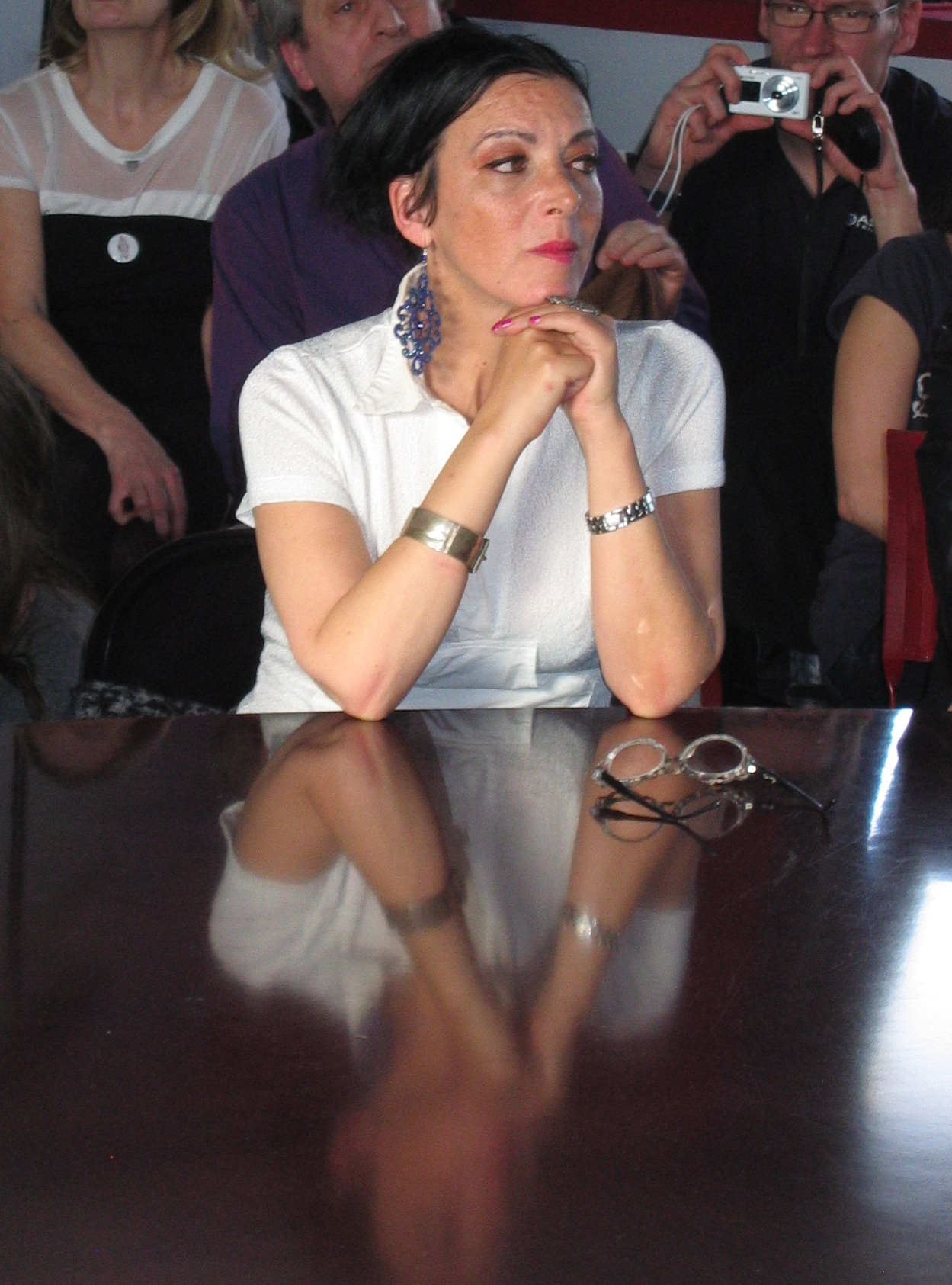 Marcela Iacub le 15 mars 2014 dans les locaux du journal Libération